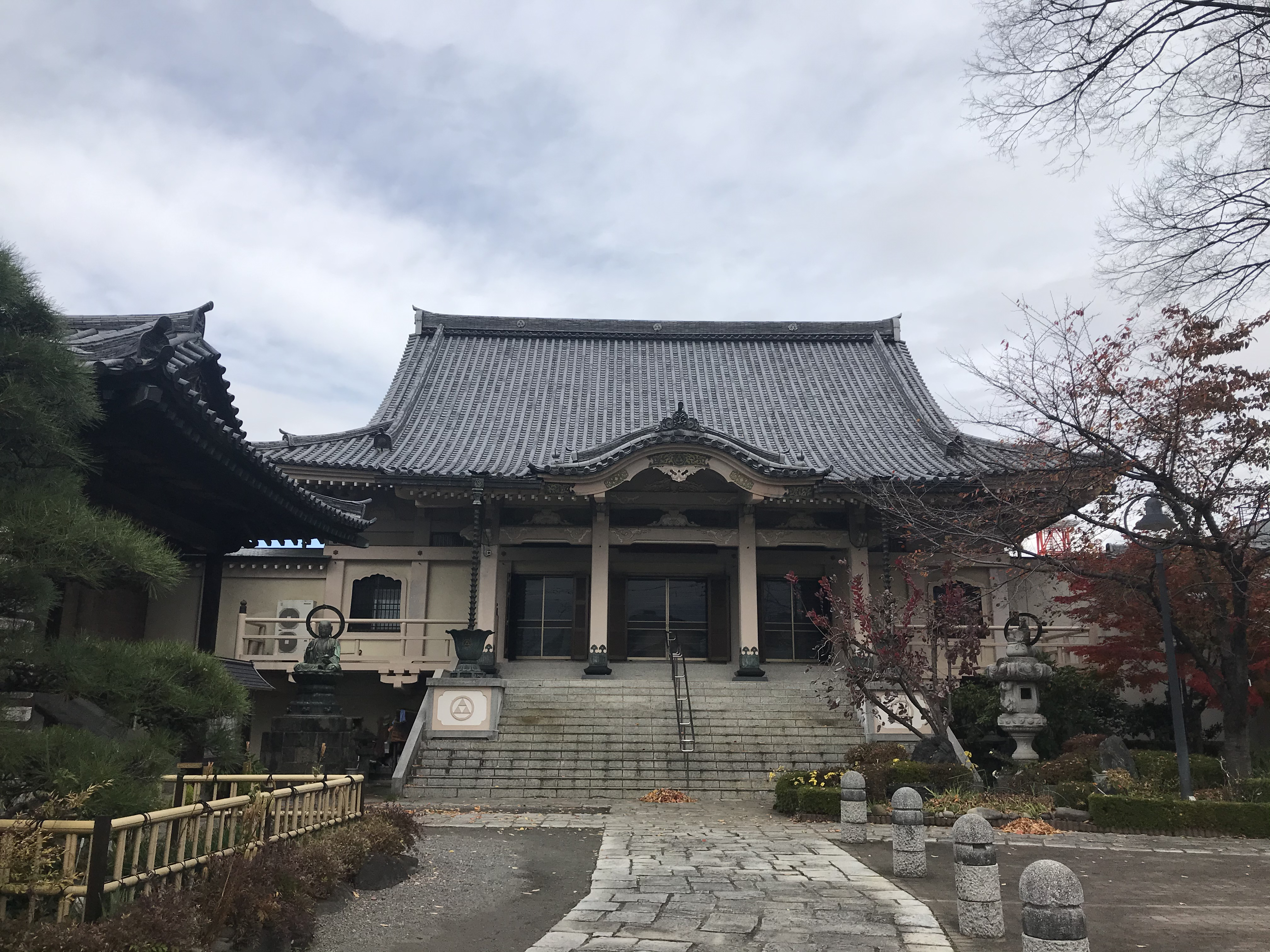 群馬県前橋市にある青松山高竹院橋林寺の本堂